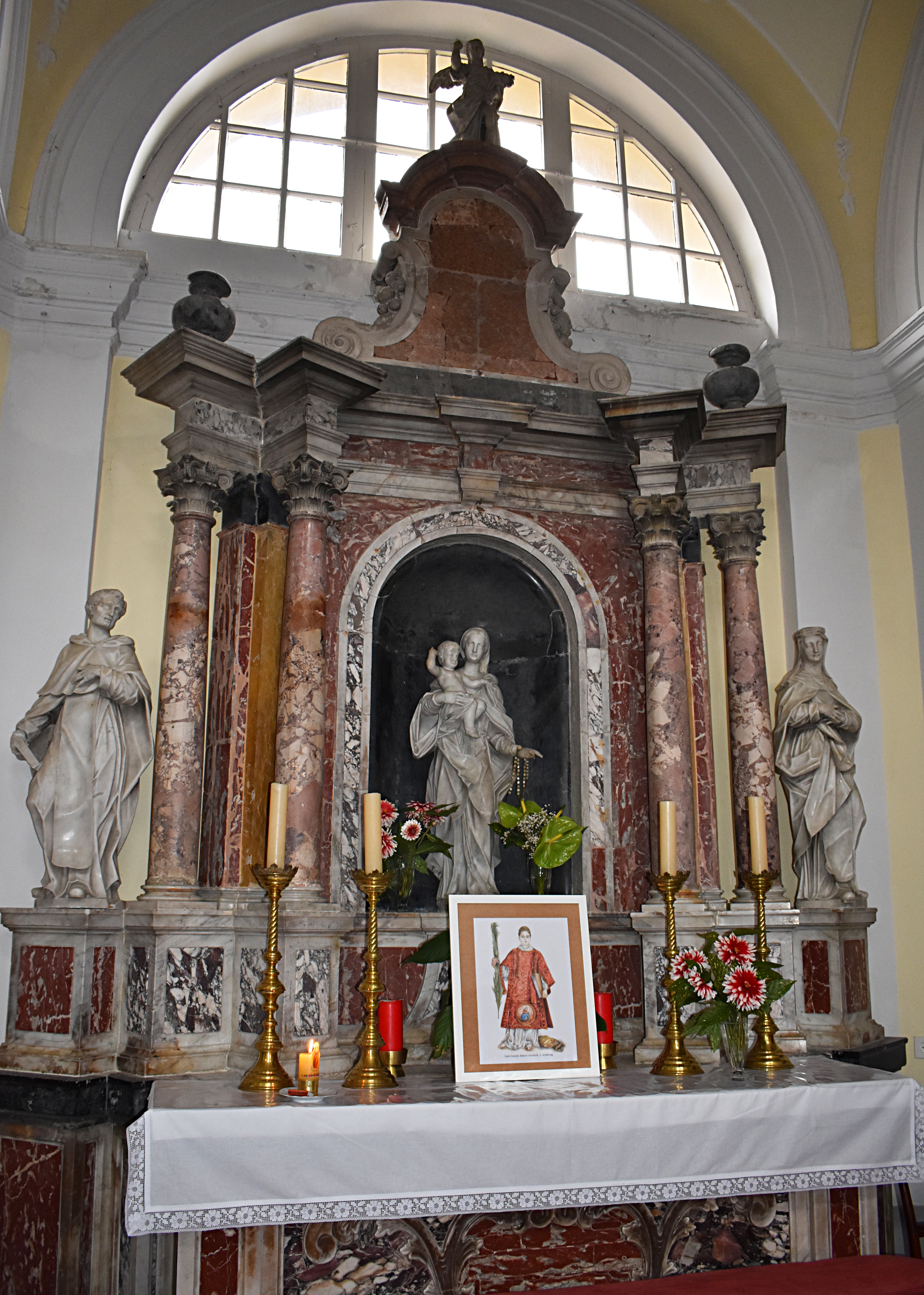 Croazia, Mošćenice, Crkva Sv. Andrije: esposizione della nuova icona di San Cesario diacono e martire, a cura della dott.ssa Mateja Jerman, 29 ottobre 2017 (Sveti Cezarej u župnoj crkvi sv. Andrije u Mošćenicama, ikona izložena od strane dr Mateja Jerman)